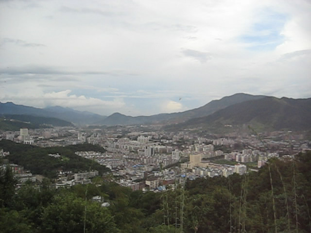 Xinluo Fujian China